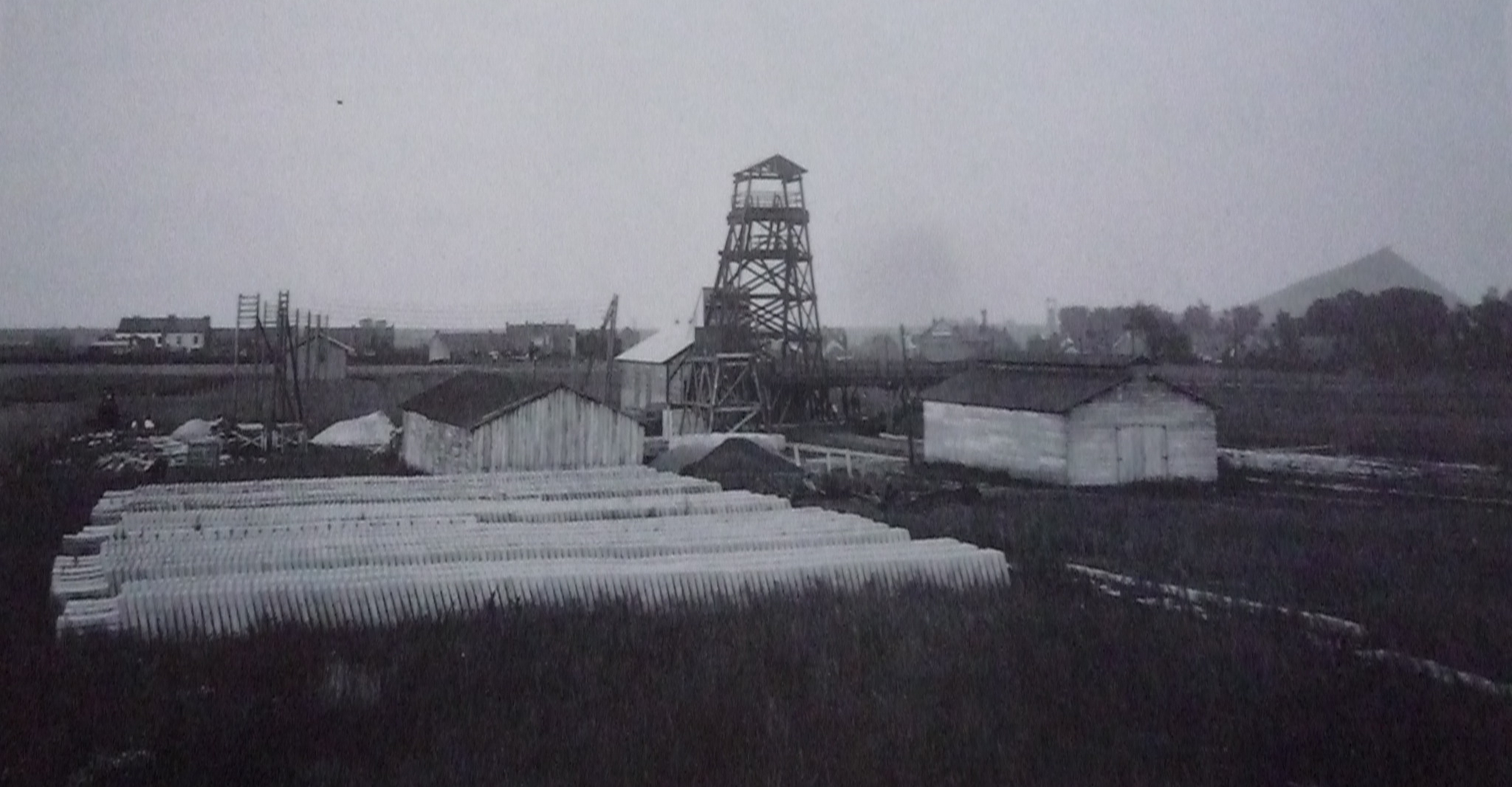 La Fosse n° 7 de la Compagnie des mines de Marles était un charbonnage constitué d'un seul puits situé à Auchel, Pas-de-Calais, Nord-Pas-de-Calais, France.